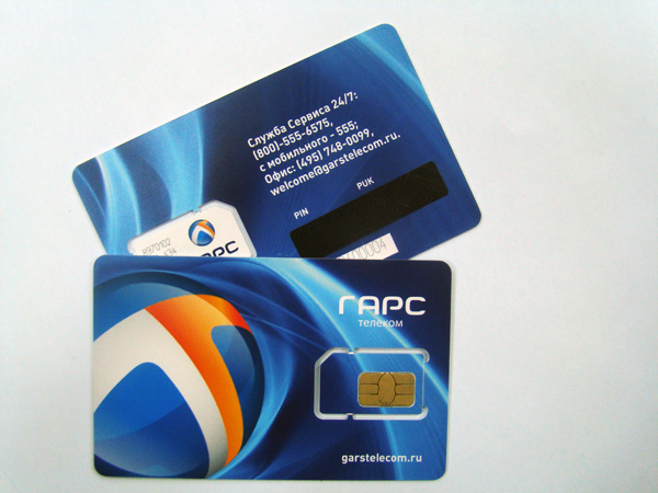 Симкарта Гарс Телеком